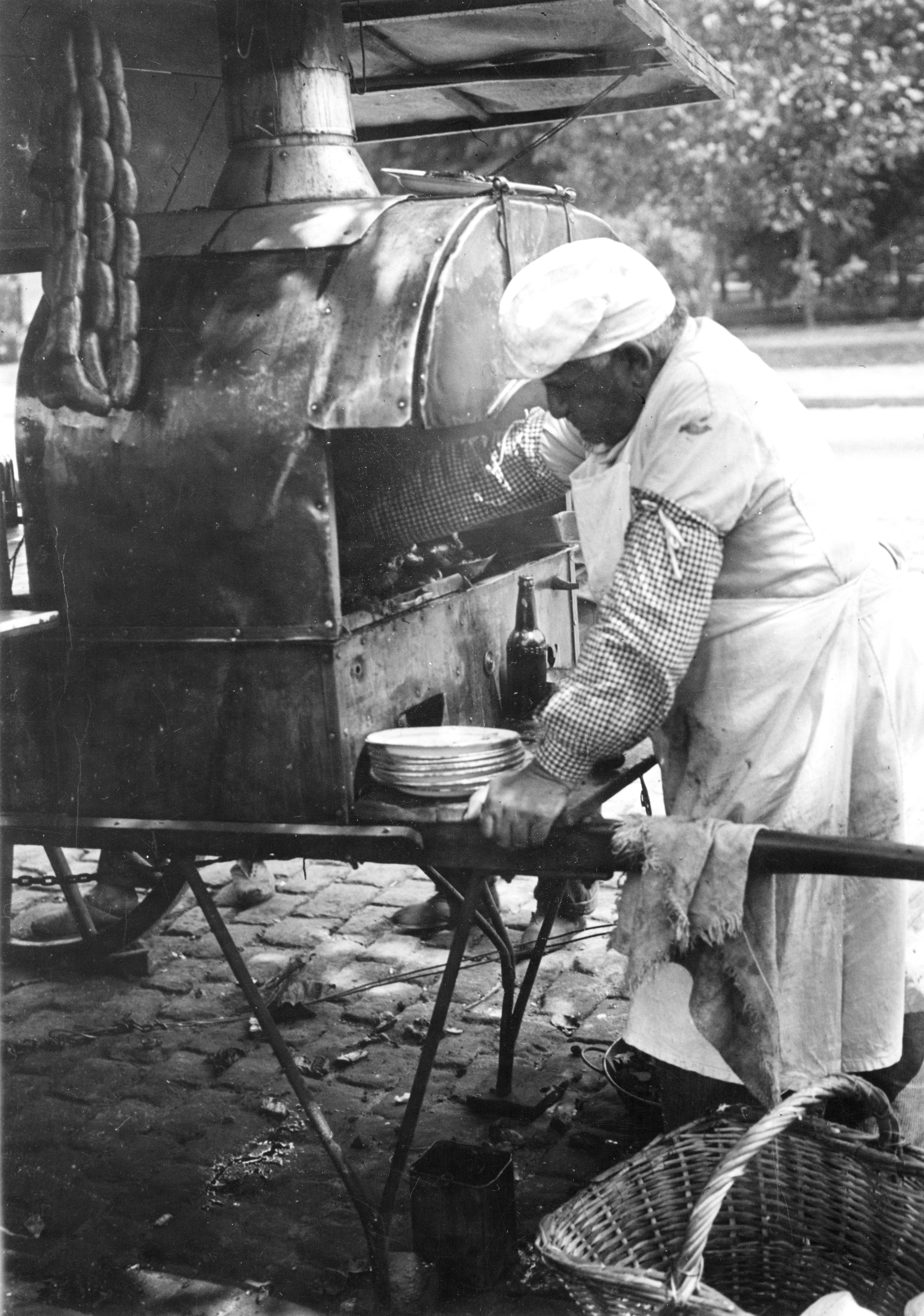 Buenos Aires, carrito de choripán, 1925. Documento fotográfico. 165462. General Archive of the Nation (Argentina) Native nameArchivo General de la Nación ArgentinaLocationBuenos Aires, ArgentinaEstablished28 August 1821WebsiteAGNAuthority control : Q2860529 This file, was provided to Wikimedia Commons thanks to an agreement between the General Archive of the Nation of Argentina and Wikimedia Argentina.